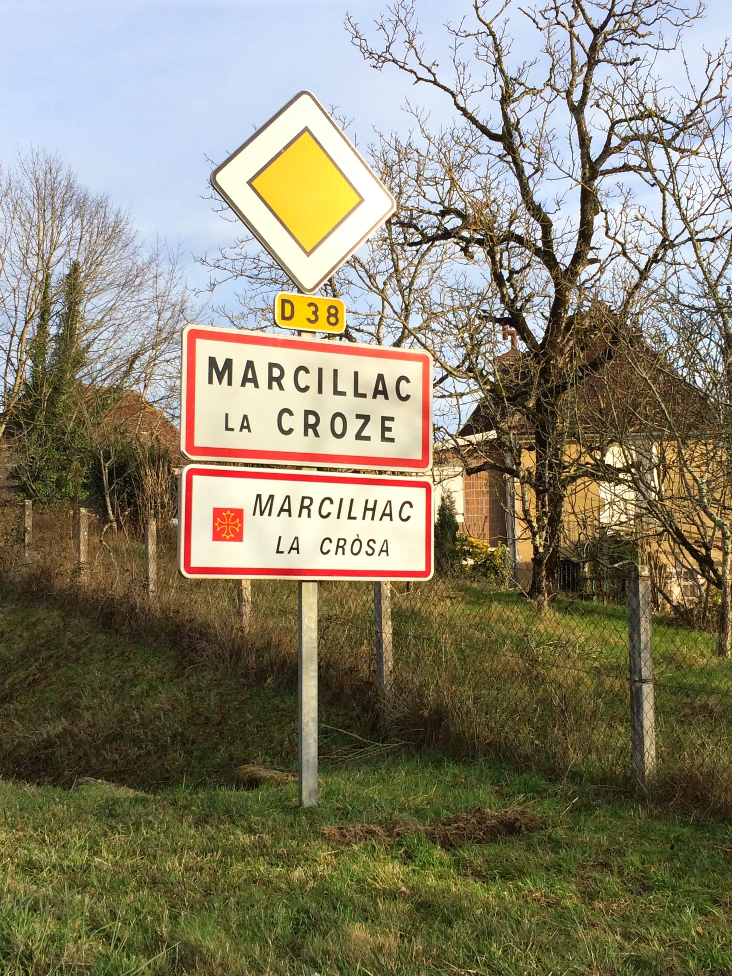 Panèl d'intrada de Marcilhac la Cròssa.